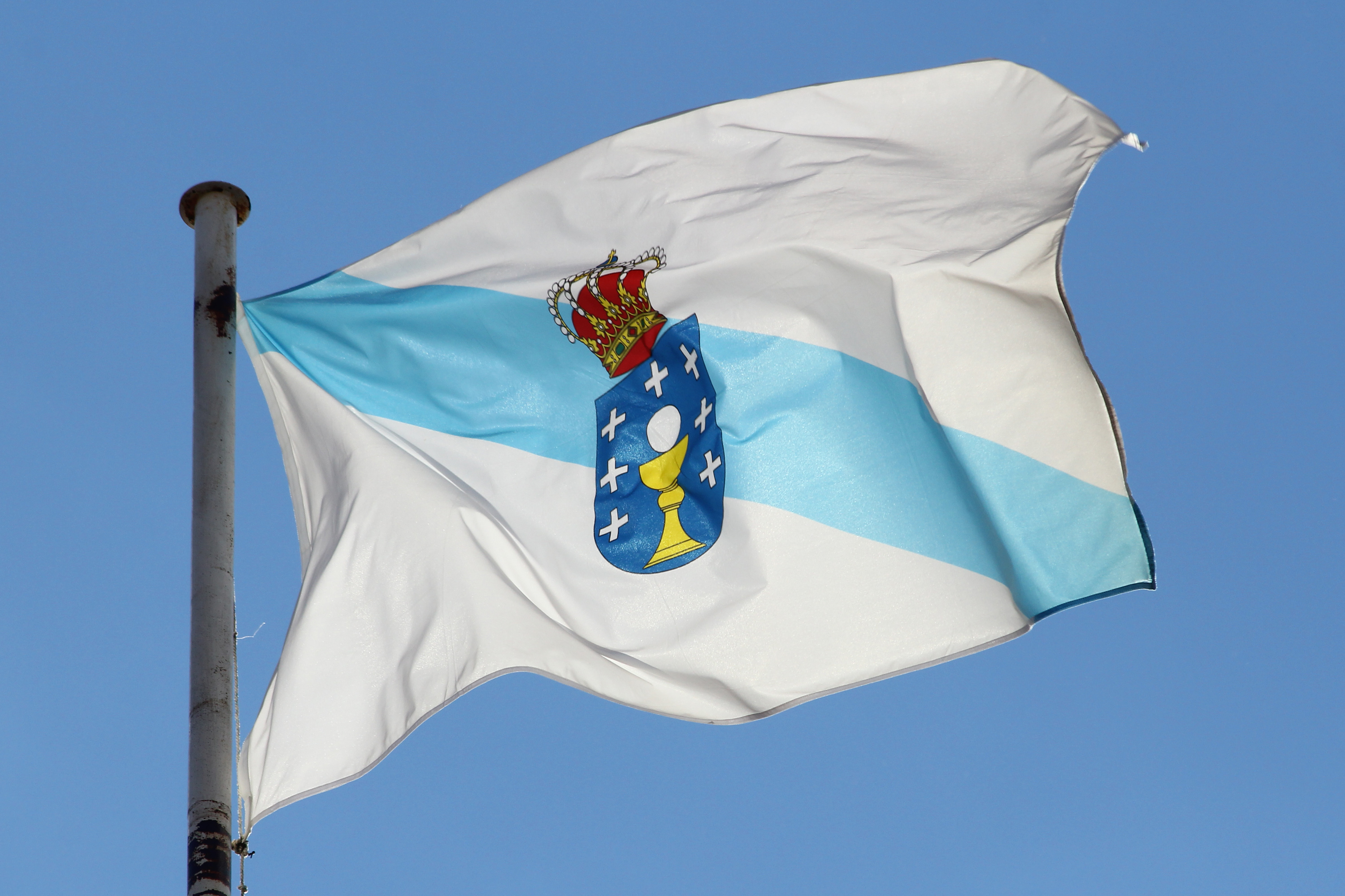 Bandeira de Galicia ondeando no Pazo de Raxoi, sede do Concello de Santiago e da Xunta de Galicia.